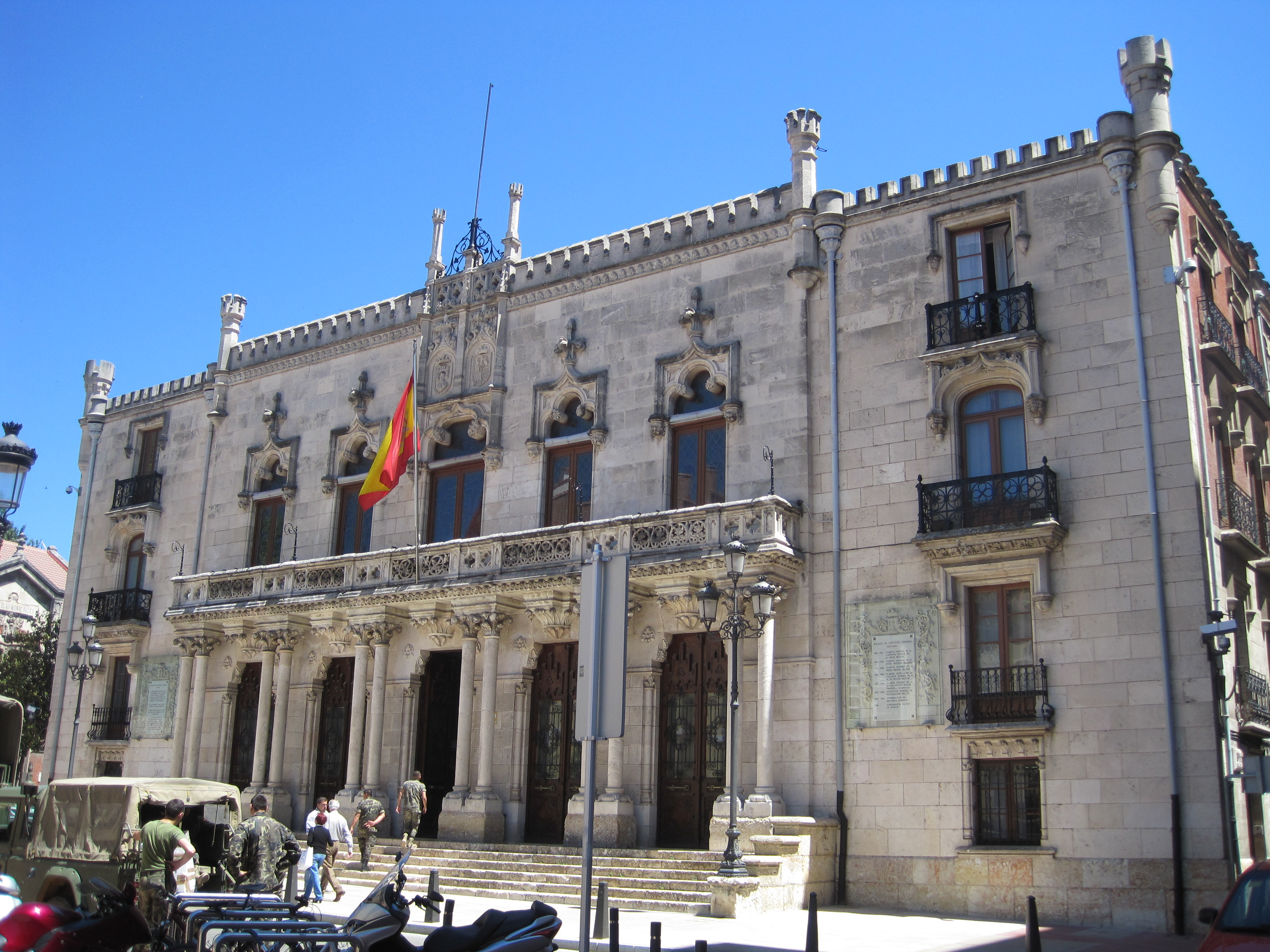 Vista de la fachada principal del Palacio de Capitanía General.